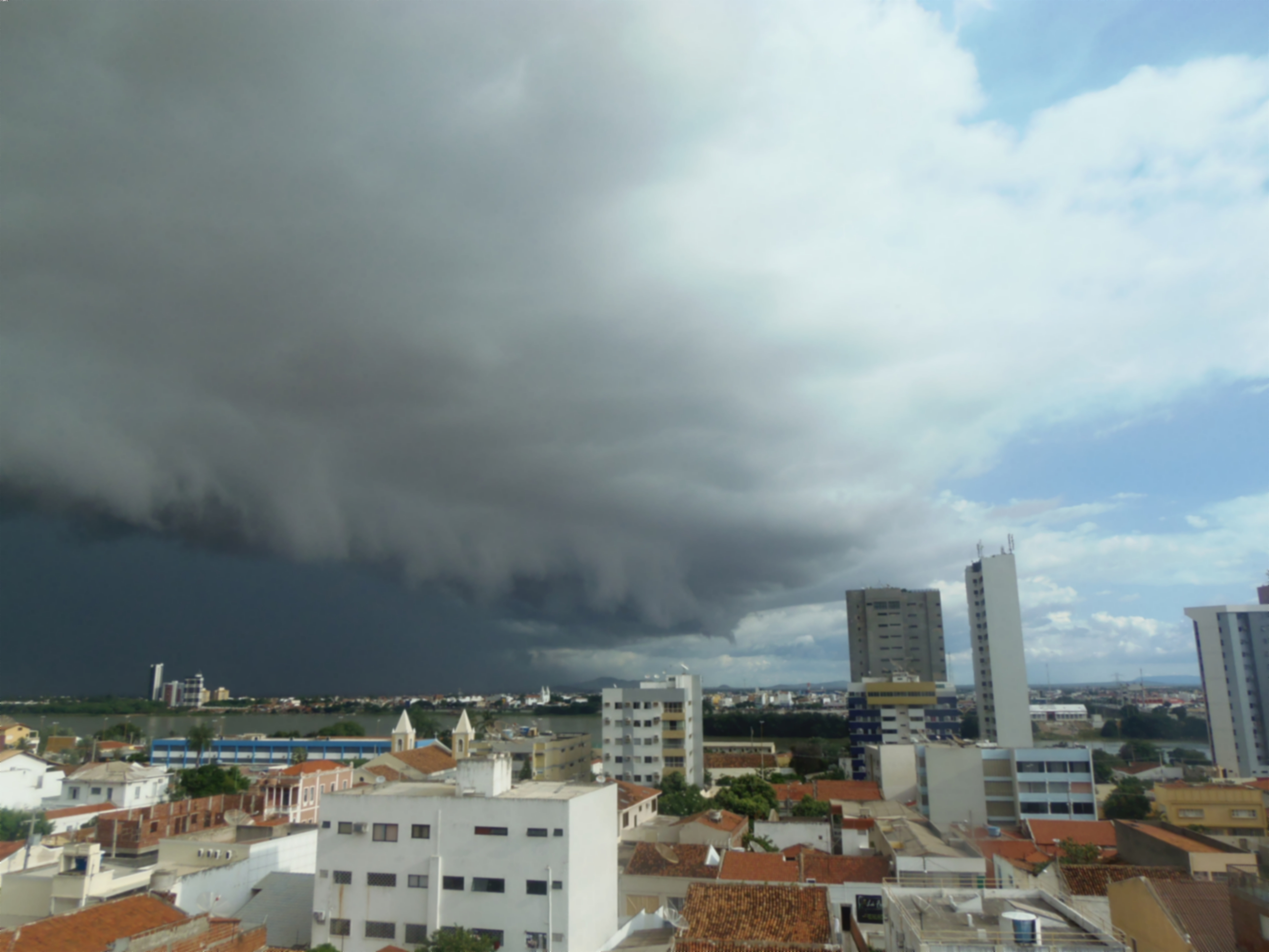 Petrolina, State of Pernambuco, Brazil